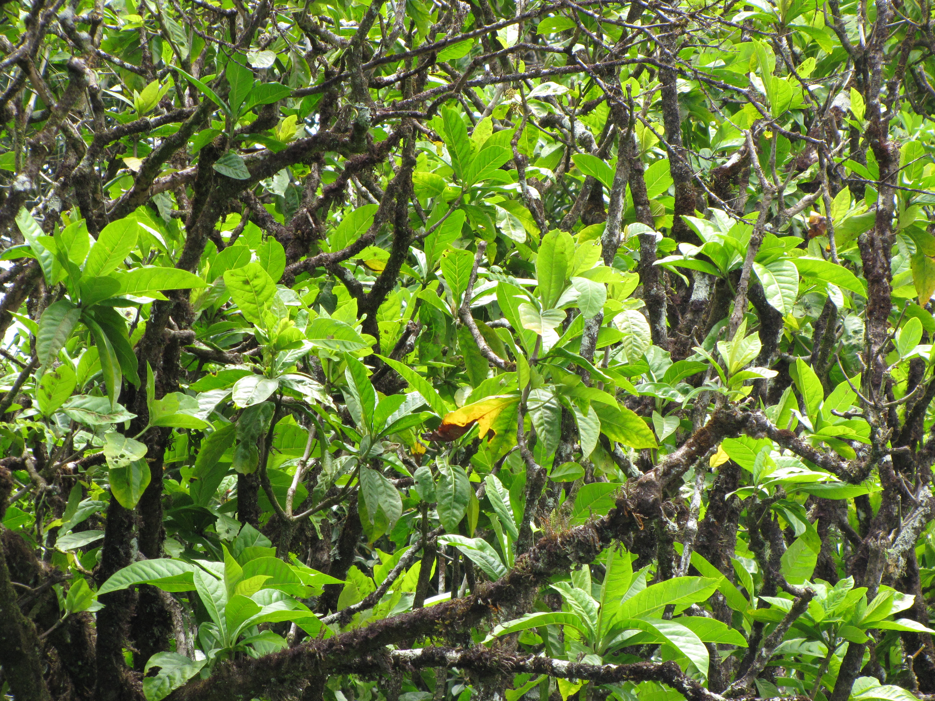 Pisonia umbellifera (Papala kepau) Leaves at Hana Hwy, Maui, Hawaii. July 02, 2009 #090702-2169 Image Use Policy